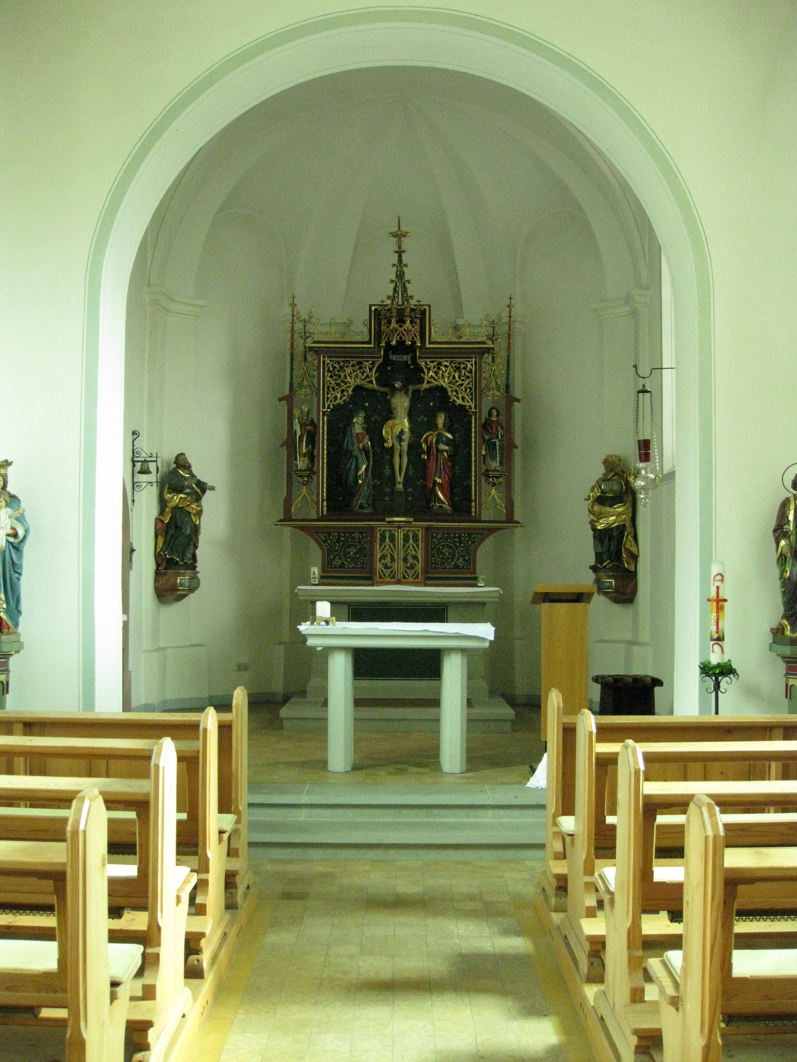 Nikolauskapelle Brunnadern (Ortsteil von Bonndorf im Schwarzwald)